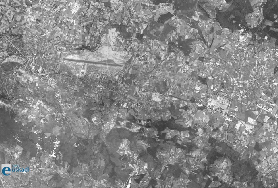 Bilboko aireportuaren ortoargazkia